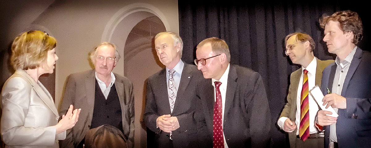 Zur Veranstaltung Was ist Gerechtigkeit im Lichthof der Leibniz Universität Hannover im 4. Festivals der Philosophie sprachen (von links): Daniela Schadt , Axel Honneth, Erich Barke, Horst Dreier, Peter Nickl und Hartmut Rosa ...